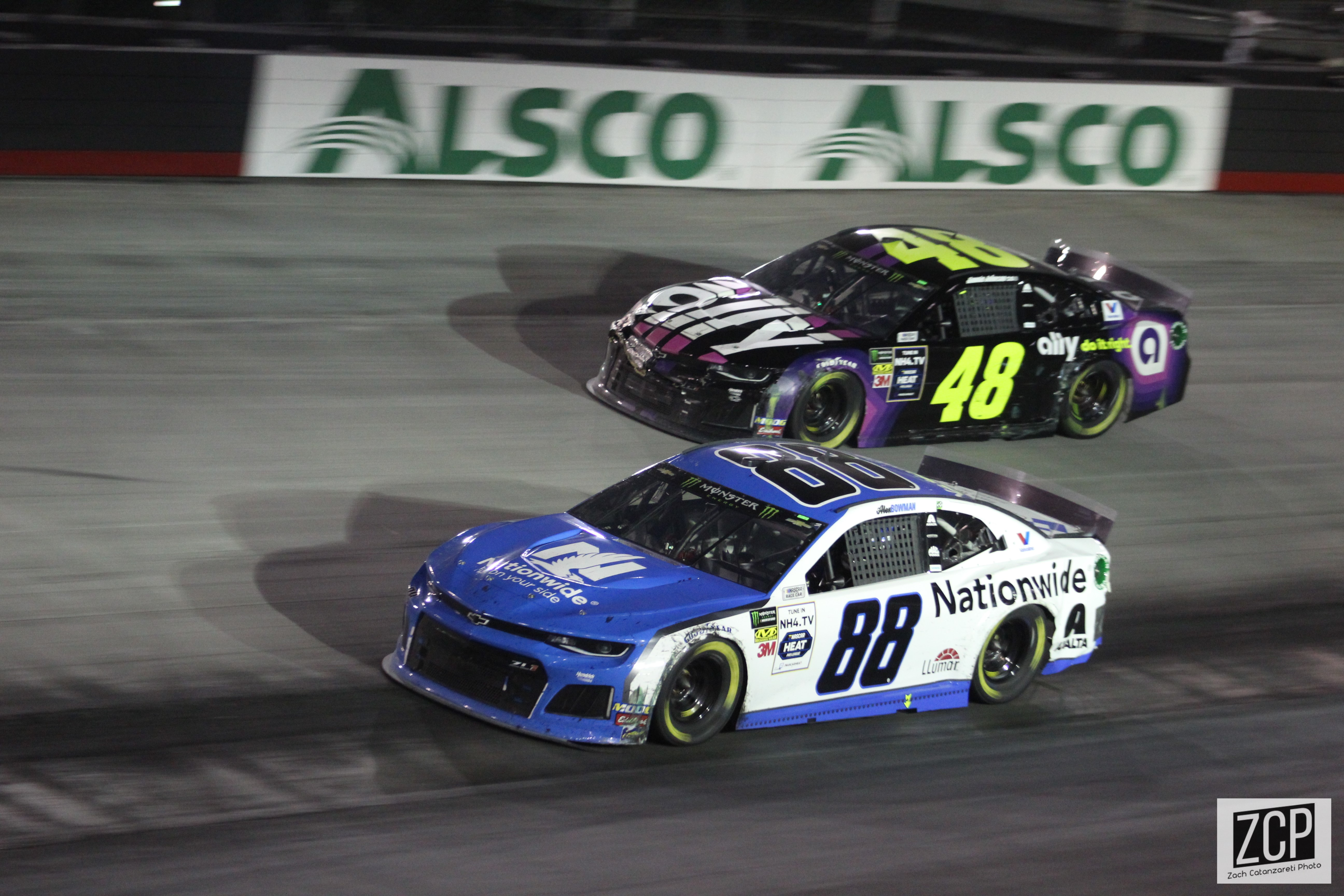 alex bowman